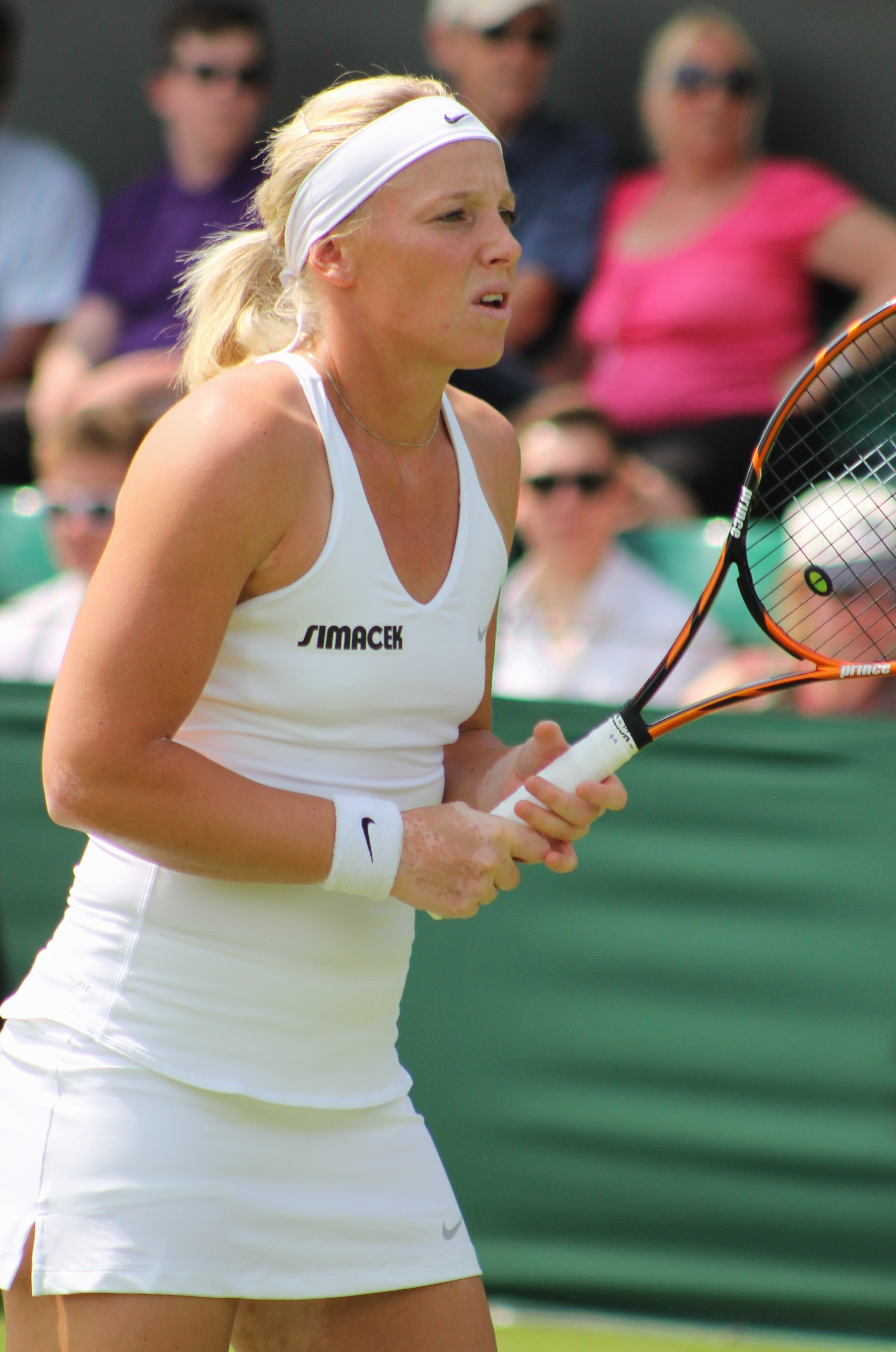 Mayr-Achleitner WM14